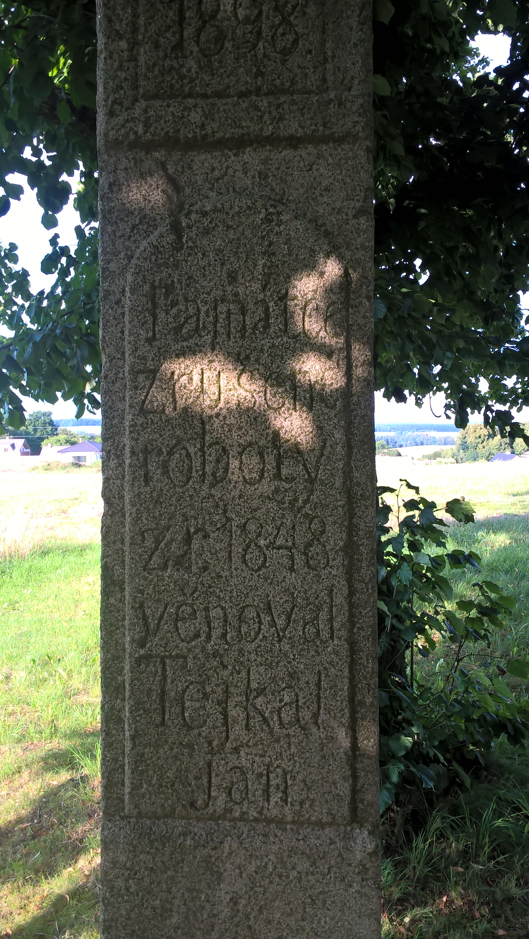 Památník zrušení roboty u Nove vsi u Světlé n. S. - detail nápisu